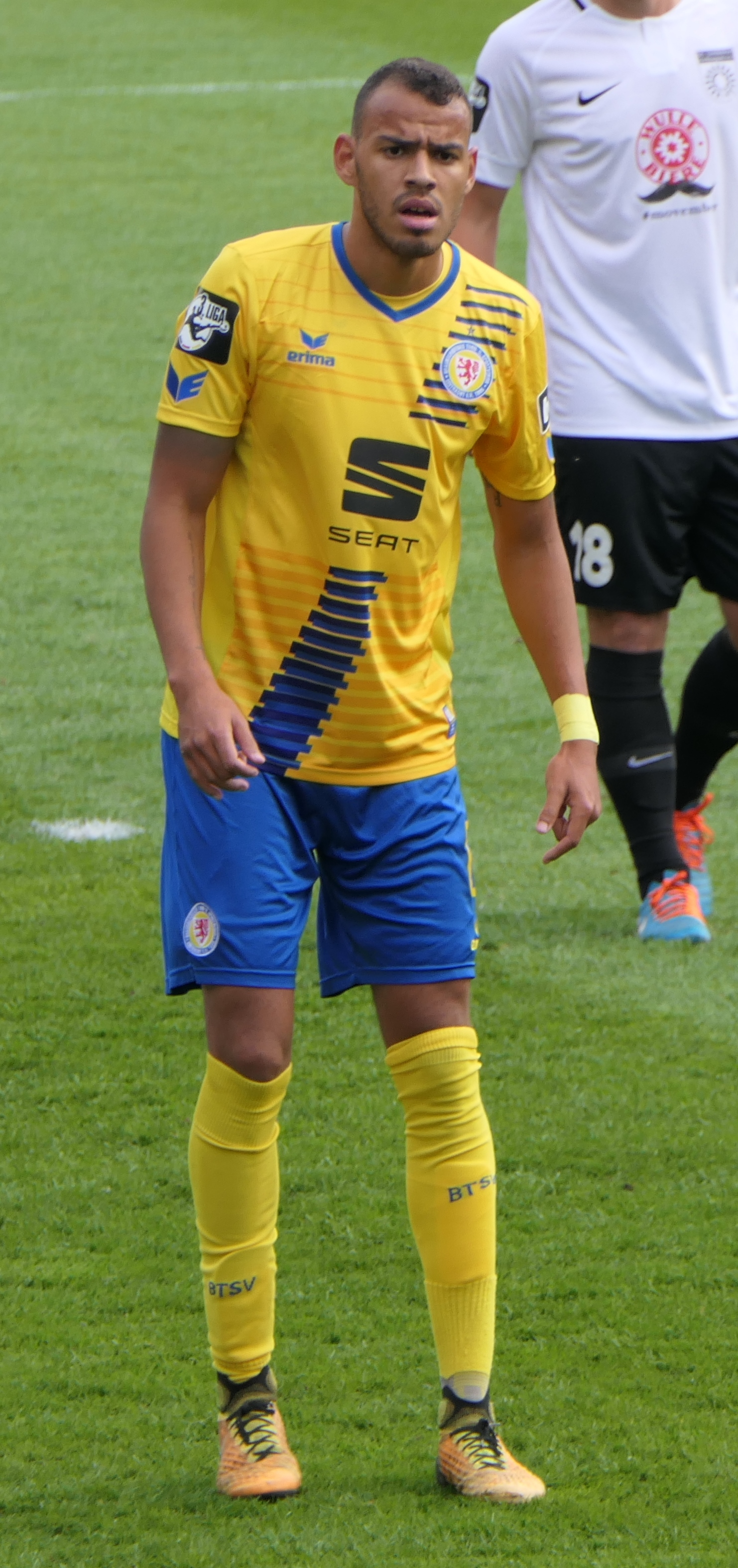 Der Fussballprofi Steffen Nkansah im Trikot von Eintracht Braunschweig beim Auswärtsspiel bei der SG Sonnenhof Großaspach am 03.11.2018.